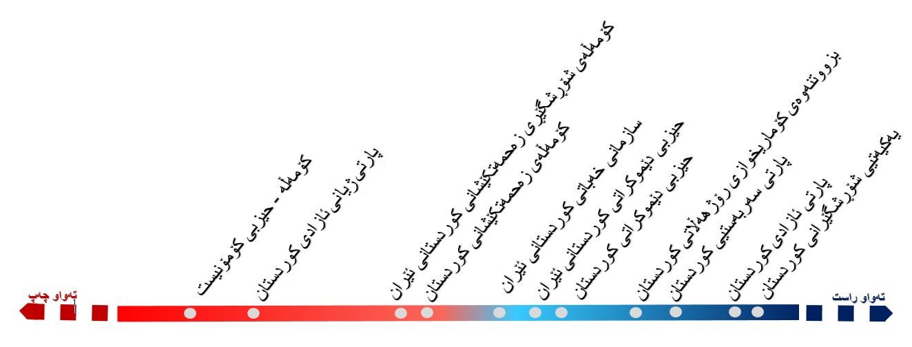 کوردیی ناوەندی: حیزبەکانی رۆژهەڵاتی کوردستان